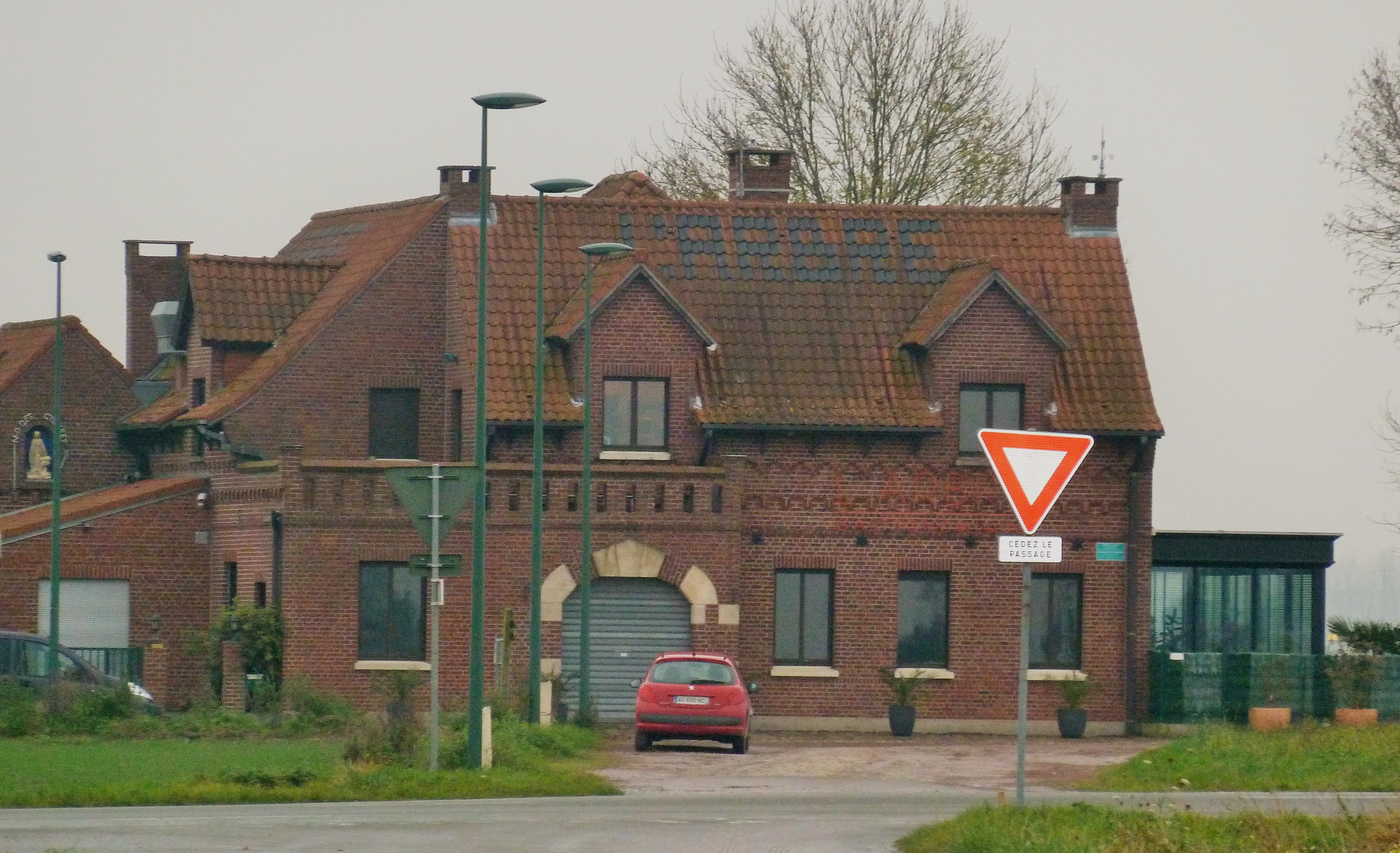 Le Carrefour de l'Arbre, à Gruson, le secteur 4 du Paris-Roubaix Nord.- France.